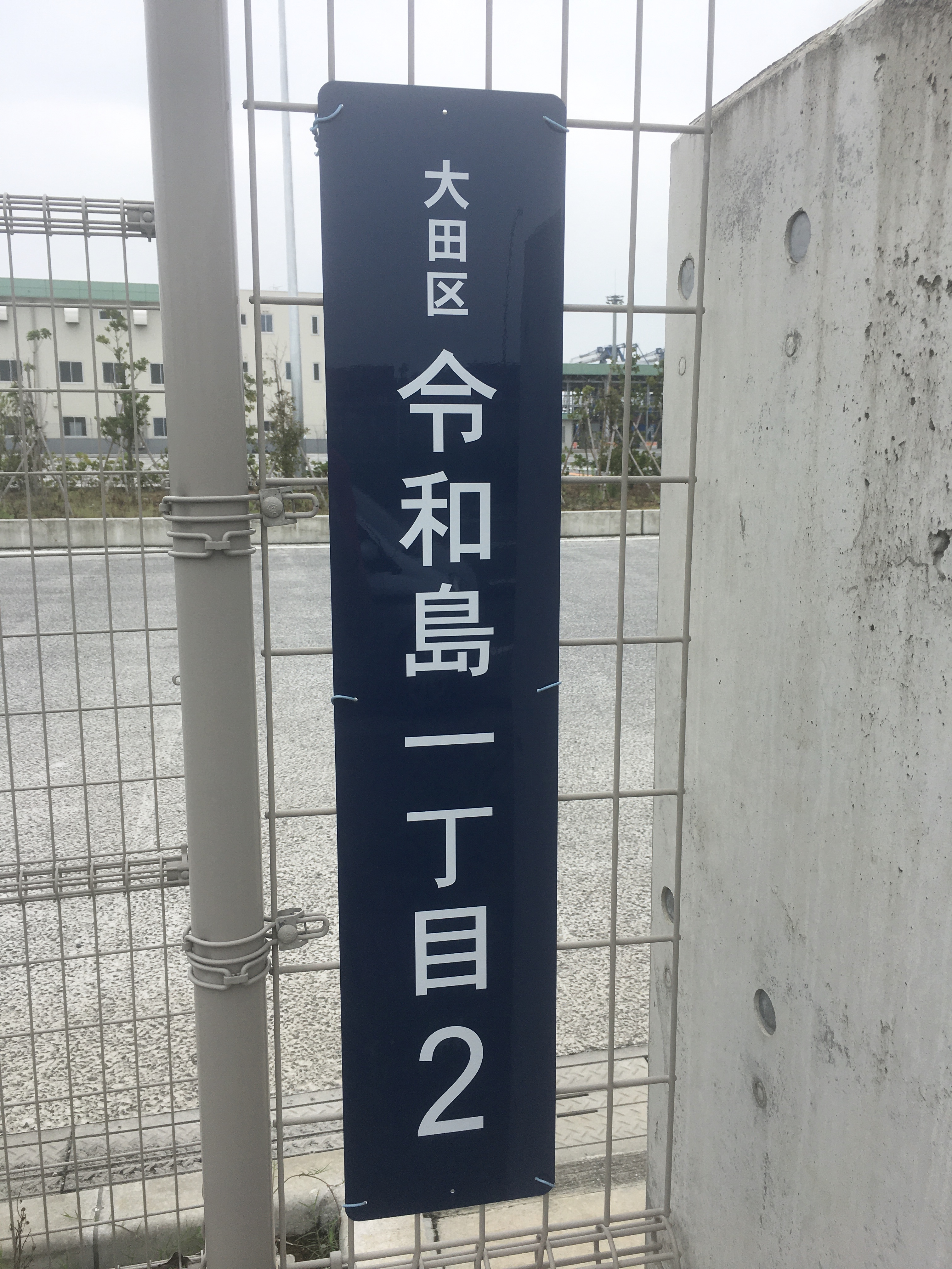 東京都大田区で2020年6月に新設された令和島の住所看板（同町は一丁目から二丁目まである）。新元号の「令和」が付く初の町名となった。